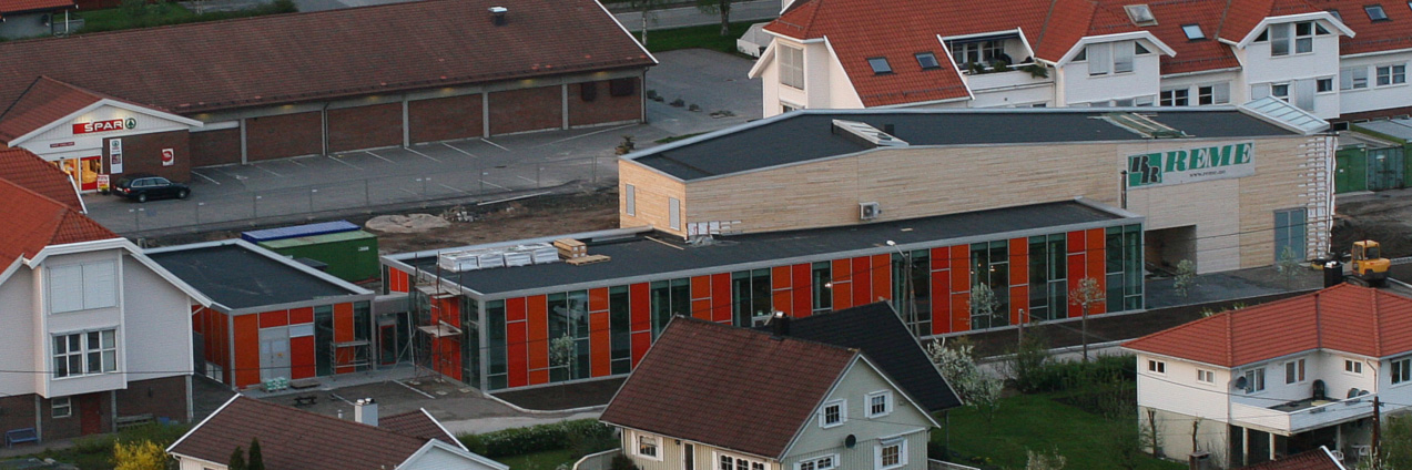 Kulturtorvet under bygging, april 2009.